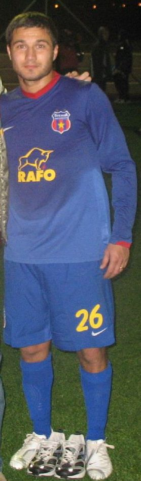 Marius Croitoru